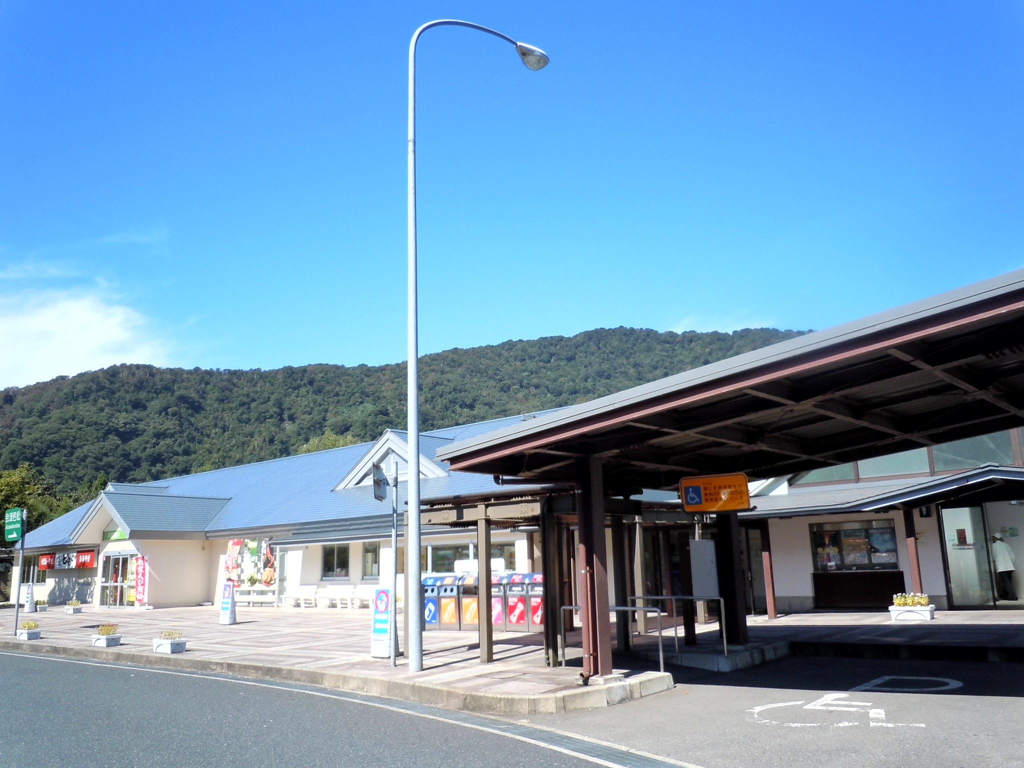 磐越自動車道 阿賀野川サービスエリア（上り線）